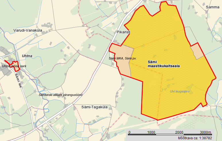 Sämi MKA paiknemine kaardil. Põhineb Maa-ameti kaardil.